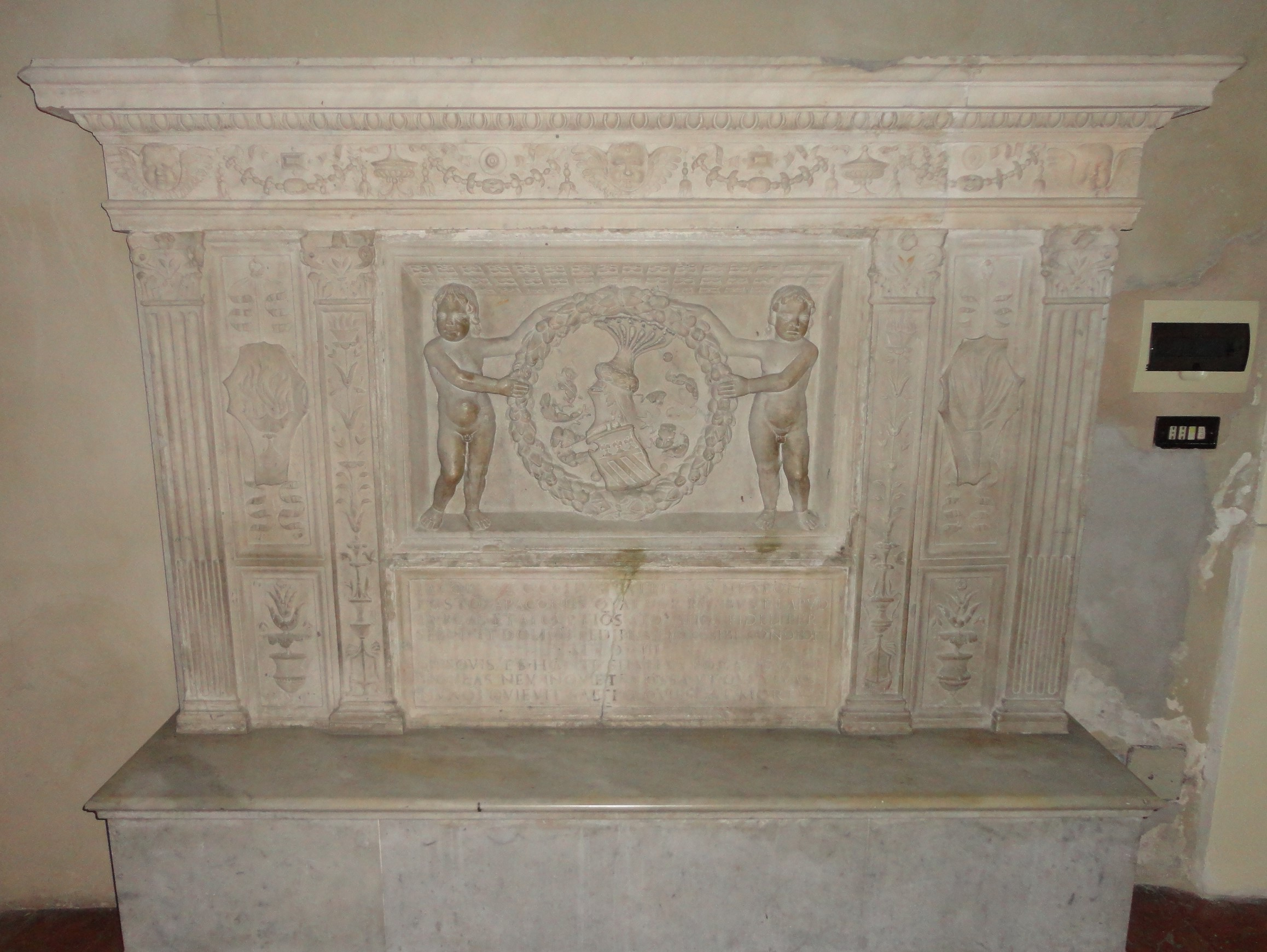 tomba di Giacomo Rocco in San Lorenzo Maggiore - Napoli